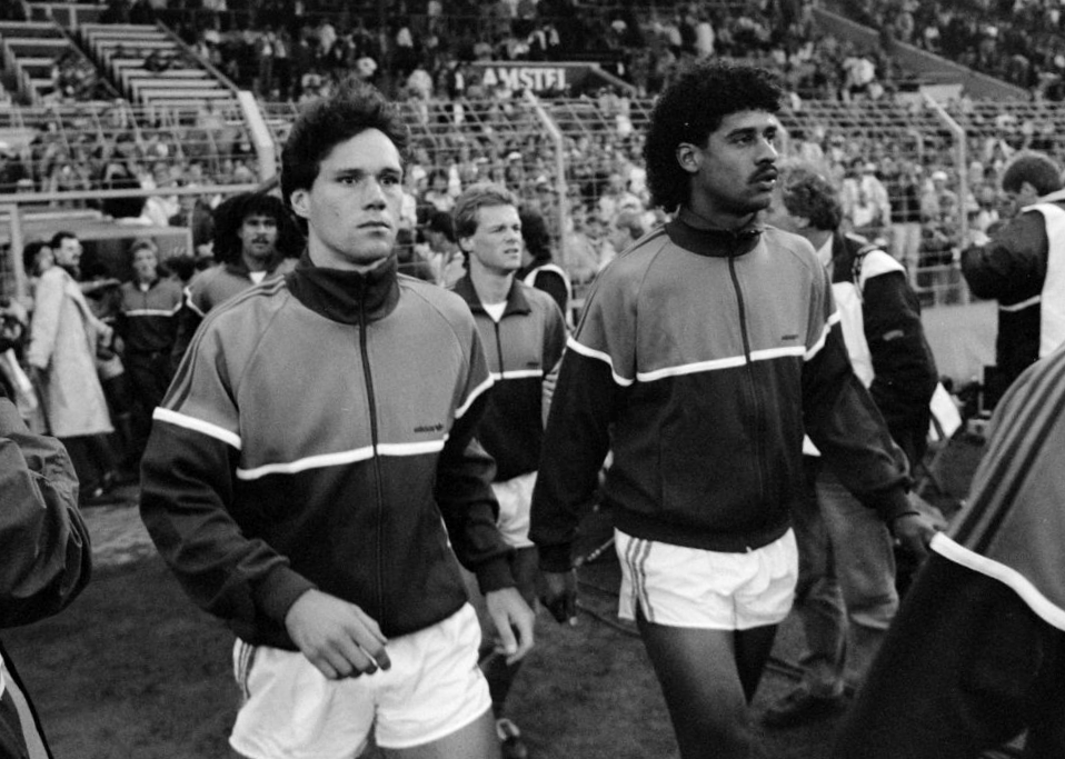 WK kwalificatie interland Nederland tegen Wales; nr. 4: Marco van Basten (l) en Frank Rijkaard komen veld op